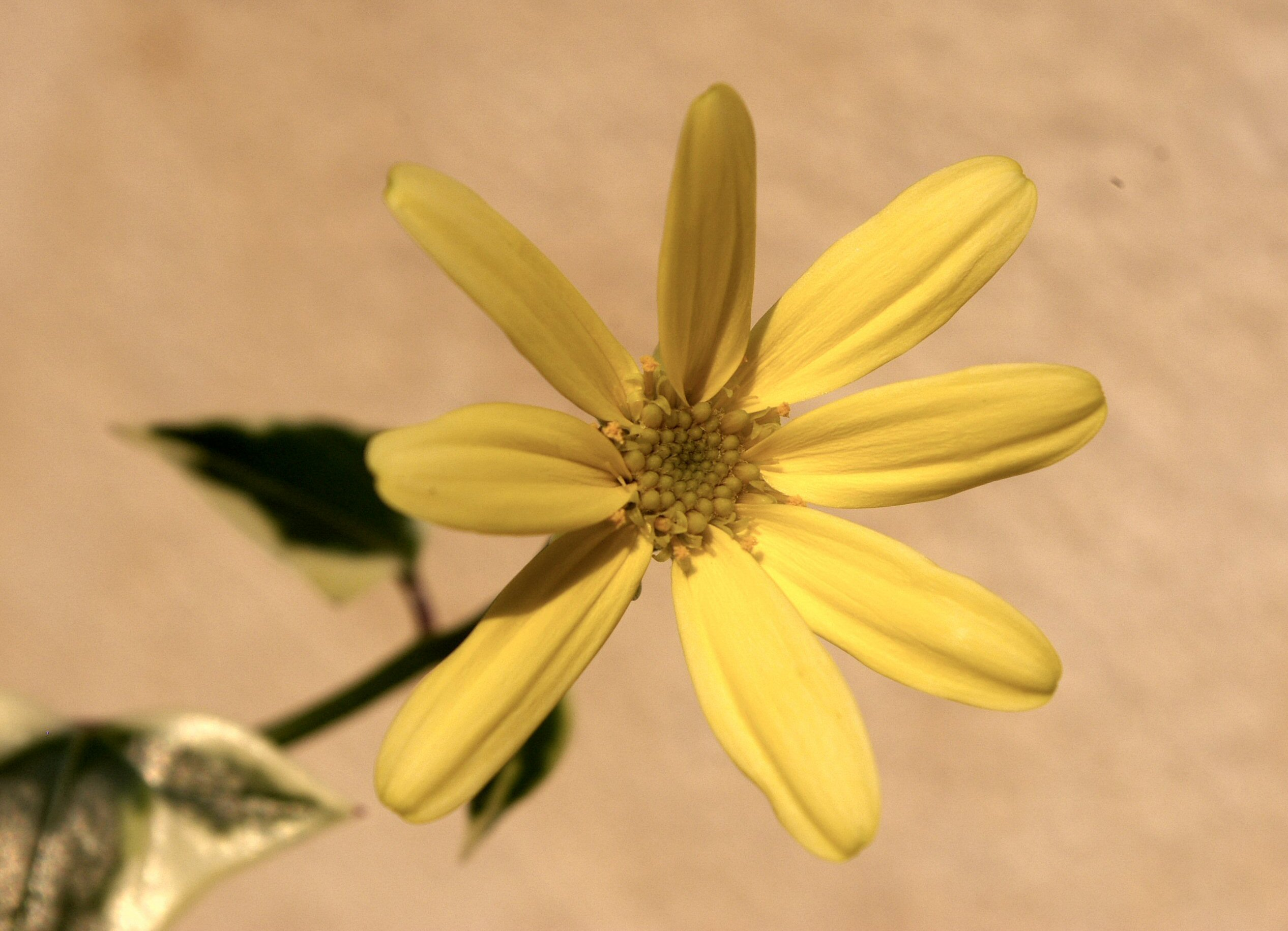 Senecio macroglossus Variegata